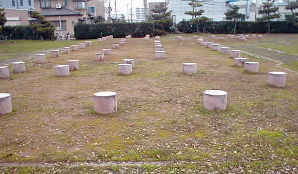 撮影者が投稿 Todaiji Yokoe Shoen Manor Site, Hakusan, Ishikawa, Japan 東大寺領横江荘荘家跡